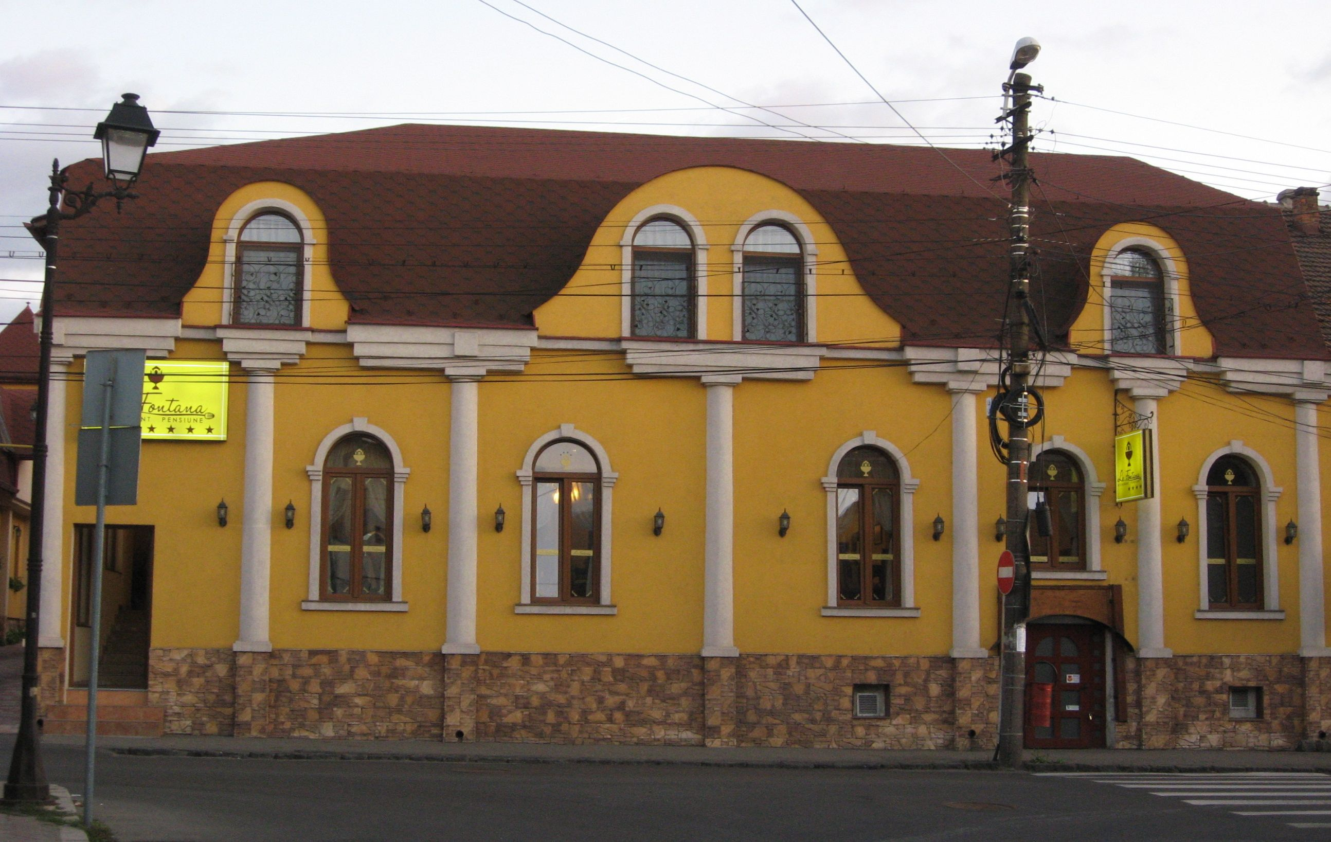 Casa Schonherr - Baia Mare